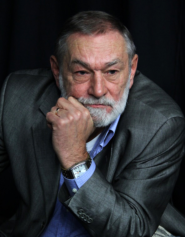 Вячеслав Гвоздков в Самаре 19.11.2010